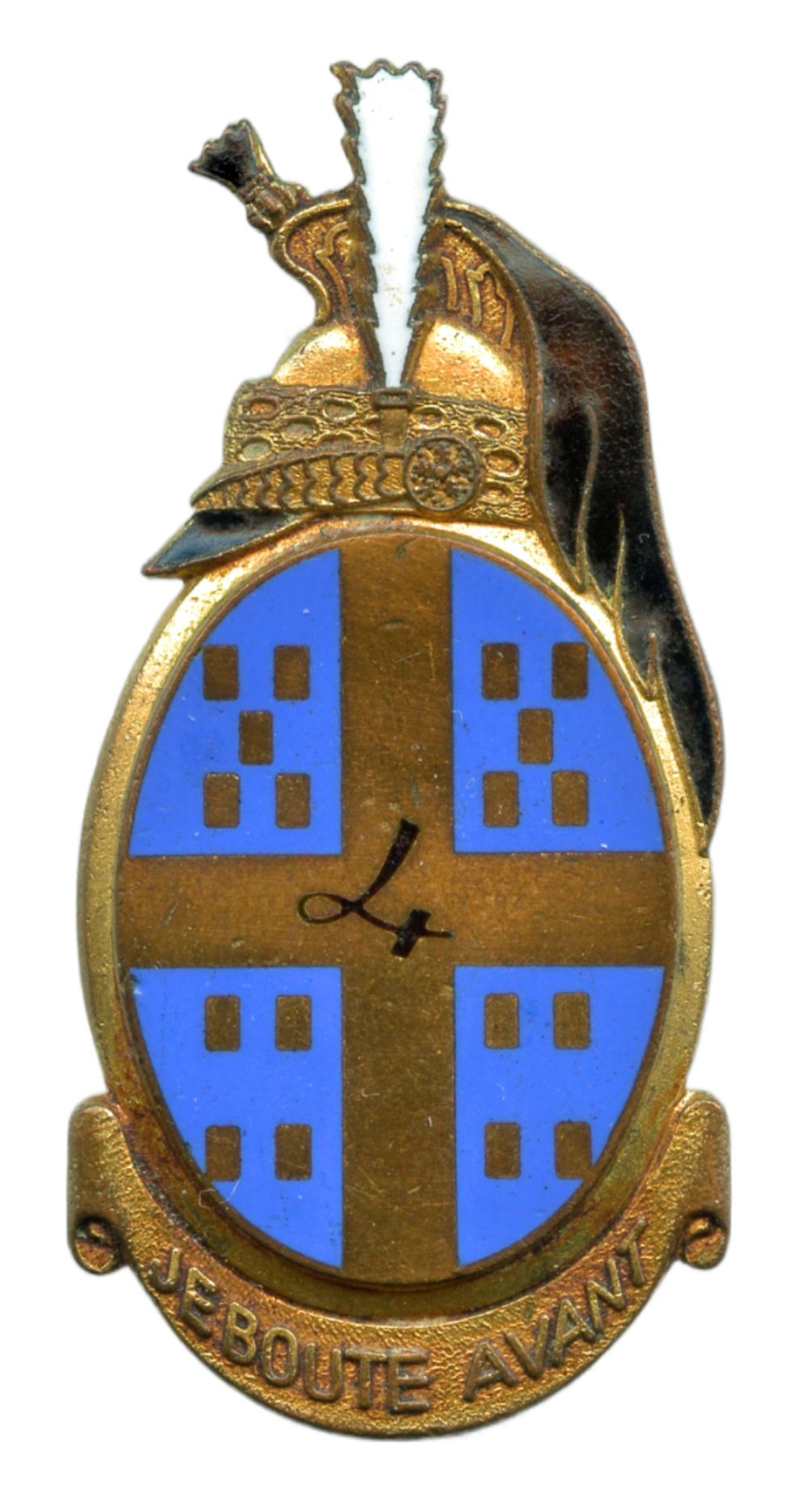 insigne régimentaire du 4e régiment de dragons.